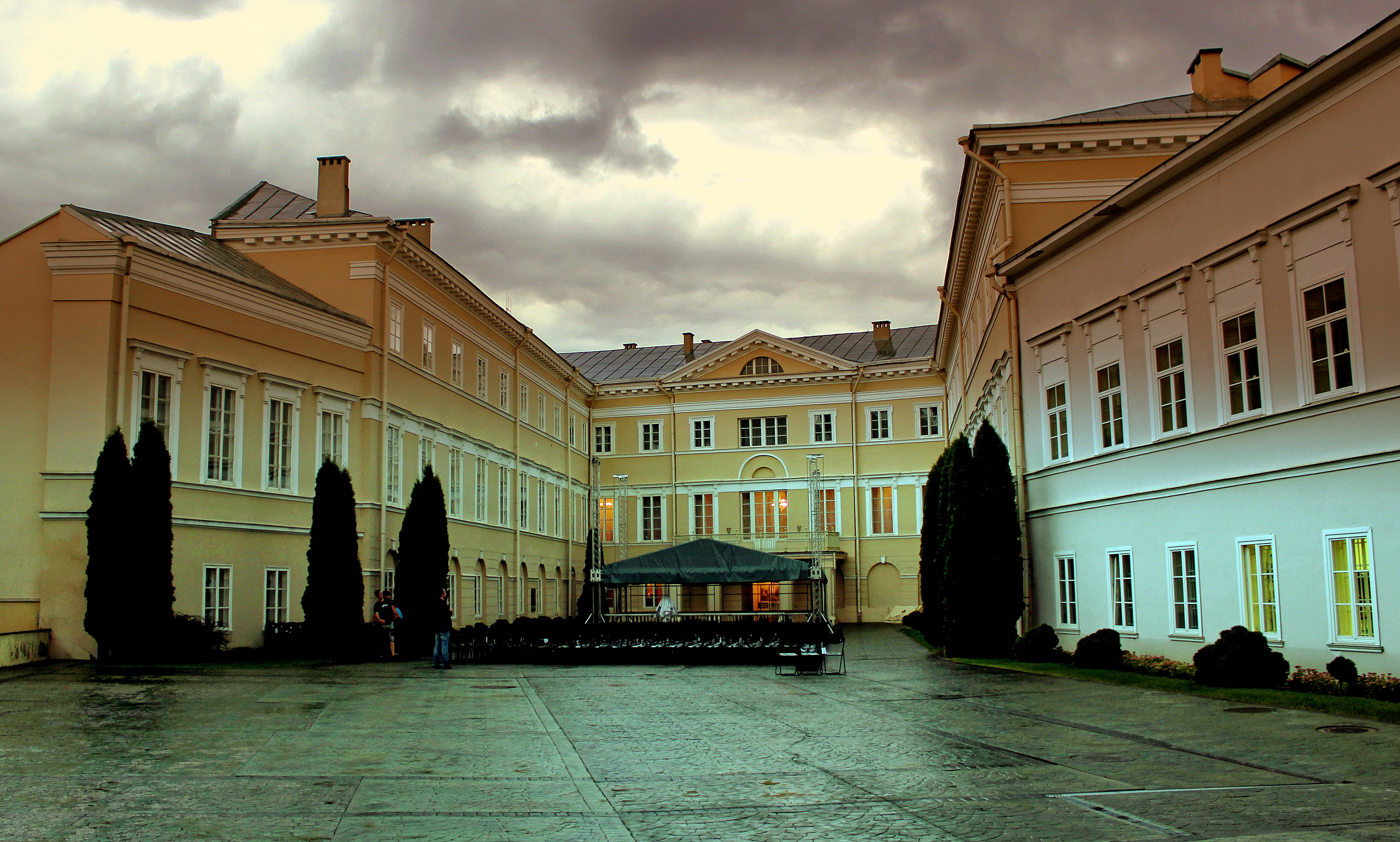 VILLINUS OLD TOWN LITHUANIA SEP 2013